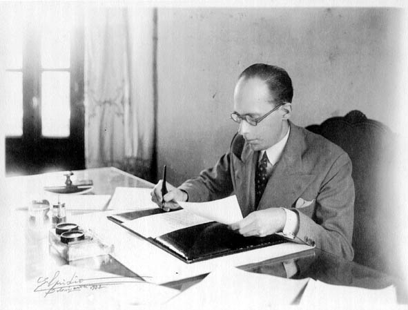 Gustavo Capanema, político brasileiro, em Belo Horizonte, 1932